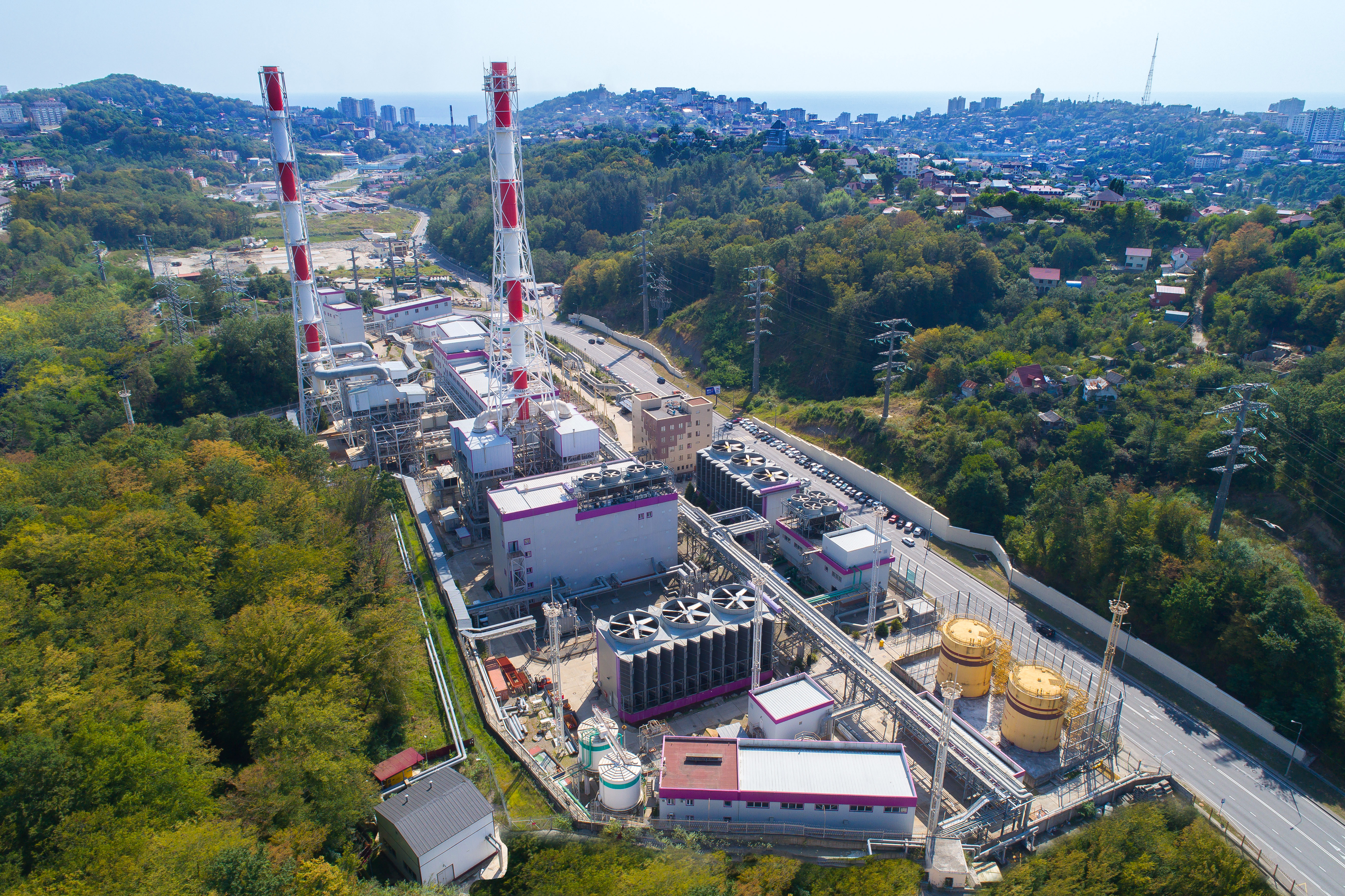 Сочинская ТЭС – один из ключевых объектов энергетики города-курорта Сочи, который обеспечивает надёжное электроснабжение потребителей центральной части города, а также района нахождения олимпийских объектов. Станция введена в эксплуатацию 20 декабря 2004 года. В настоящее время установленная мощность Сочинской ТЭС составляет 160,5 МВт (два блока мощностью по 39 МВт и один блок мощностью 82,5 МВт). Основным топливом для электростанции является природный газ, аварийное топливо – дизель. Выдача мощности осуществляется в сети с напряжением 220 кВ и 110 кВ.